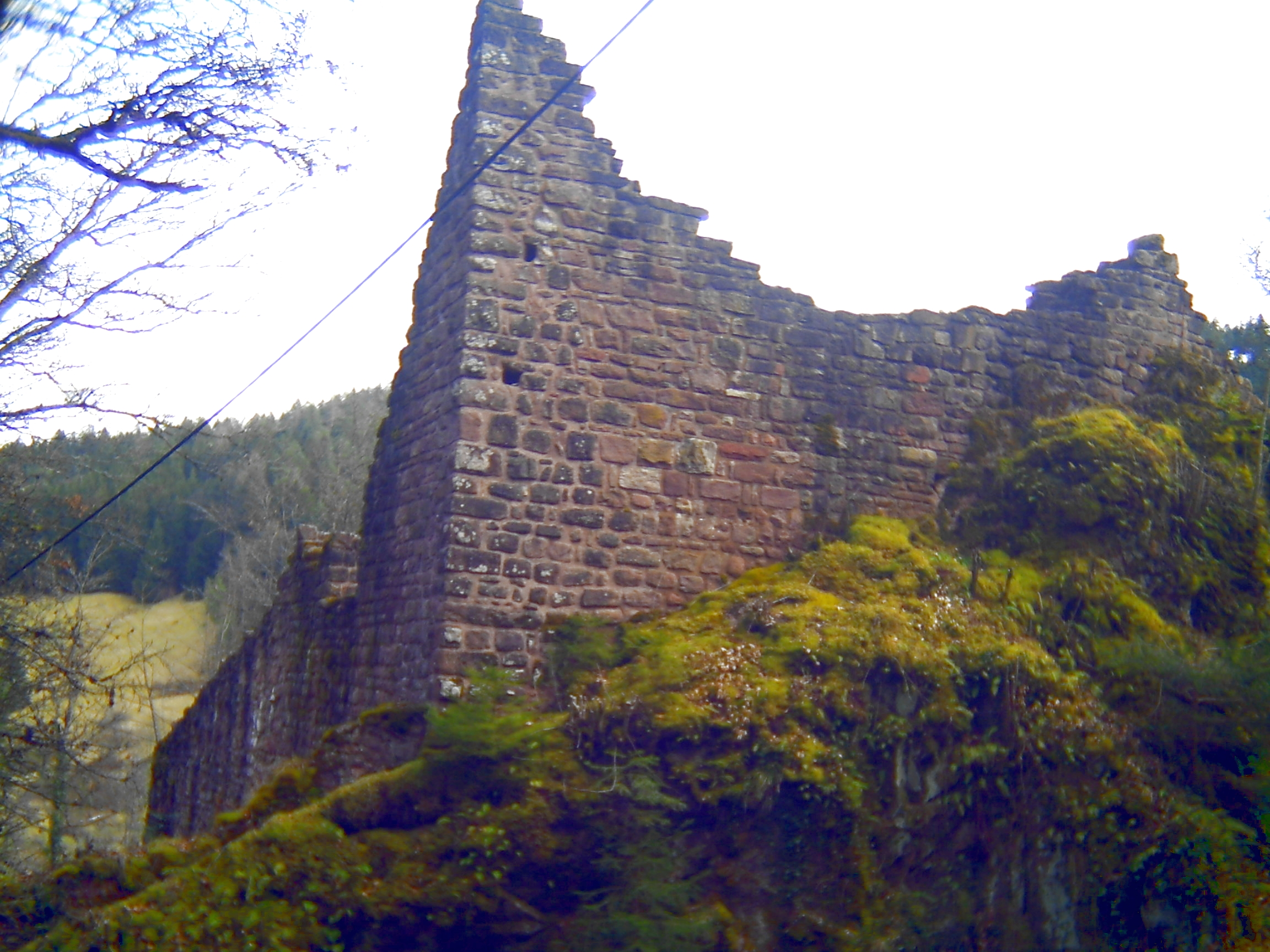 Ruine Falkenstein, Schramberg, Untere Burgruine